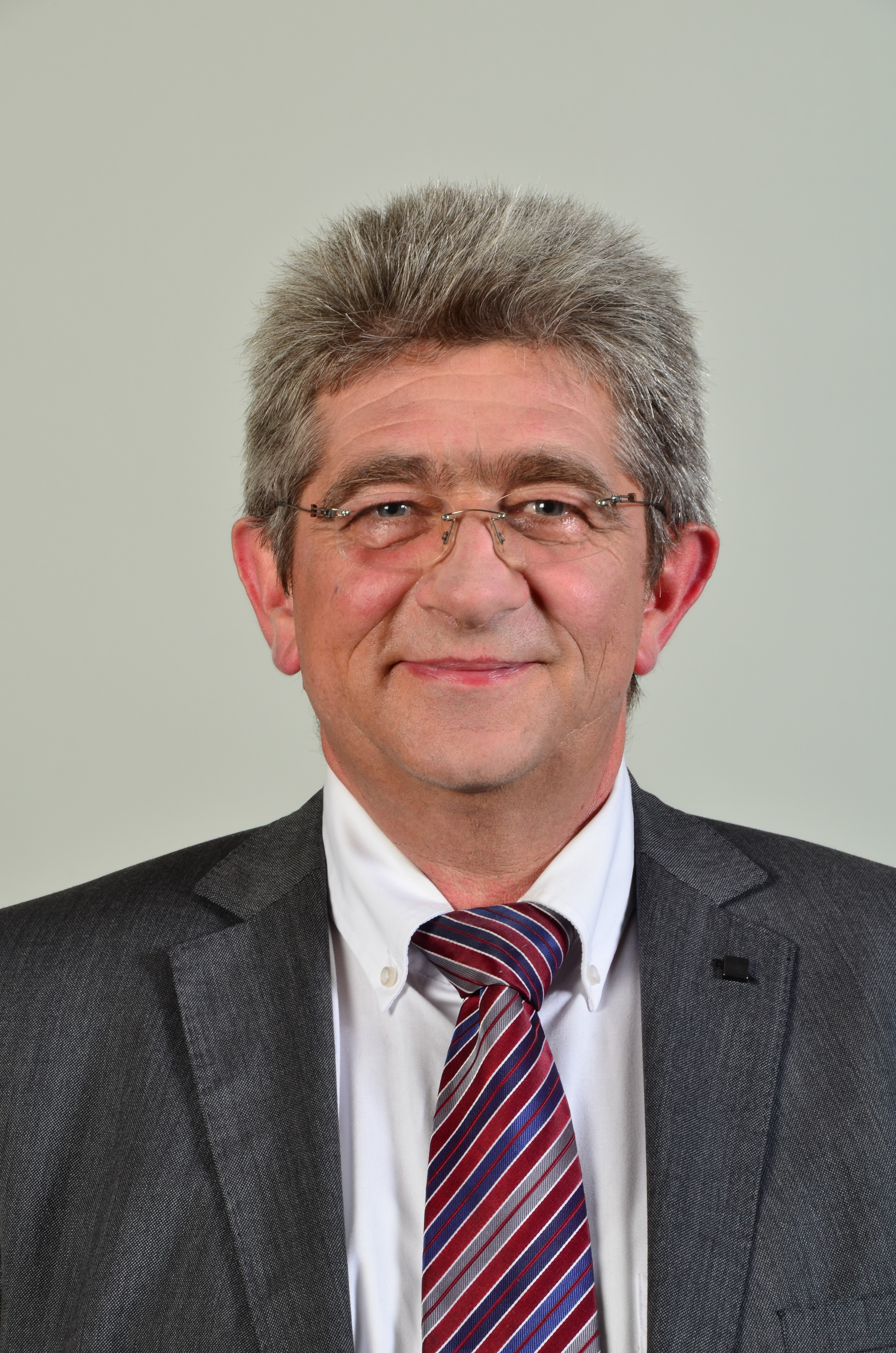 Burkhard Lenz, (CD), Mitglied des Landtages von Mecklenburg-Vorpommern